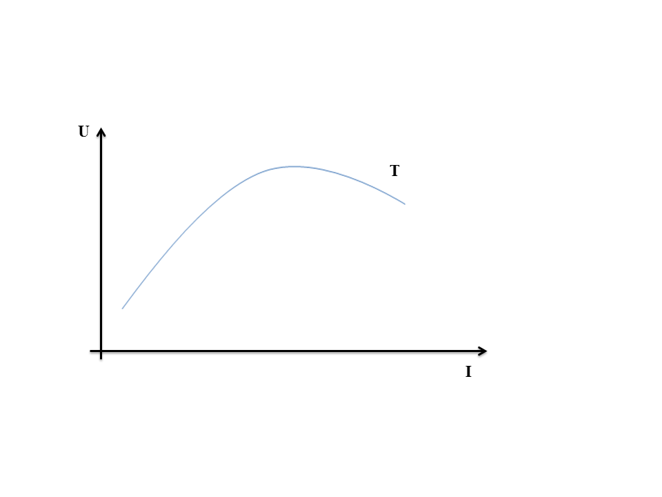 Soros gerjesztésű generátor külső, terhelési karakterisztikája